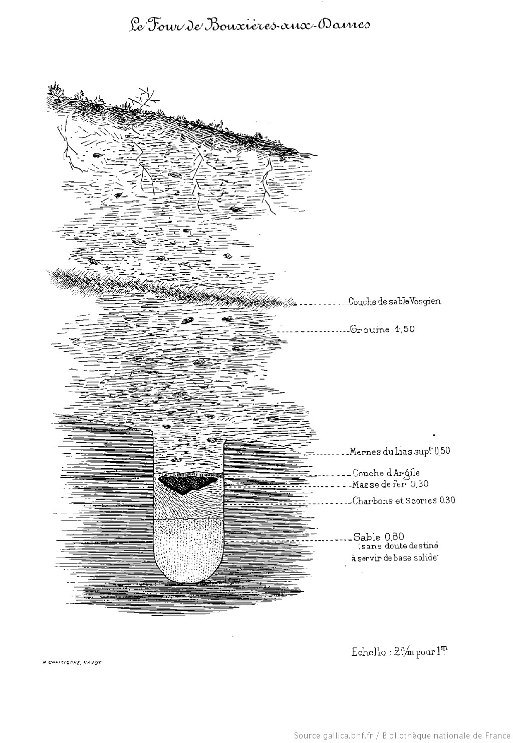 Le four de Bouxières aux Dames, tiré de Template:Article.